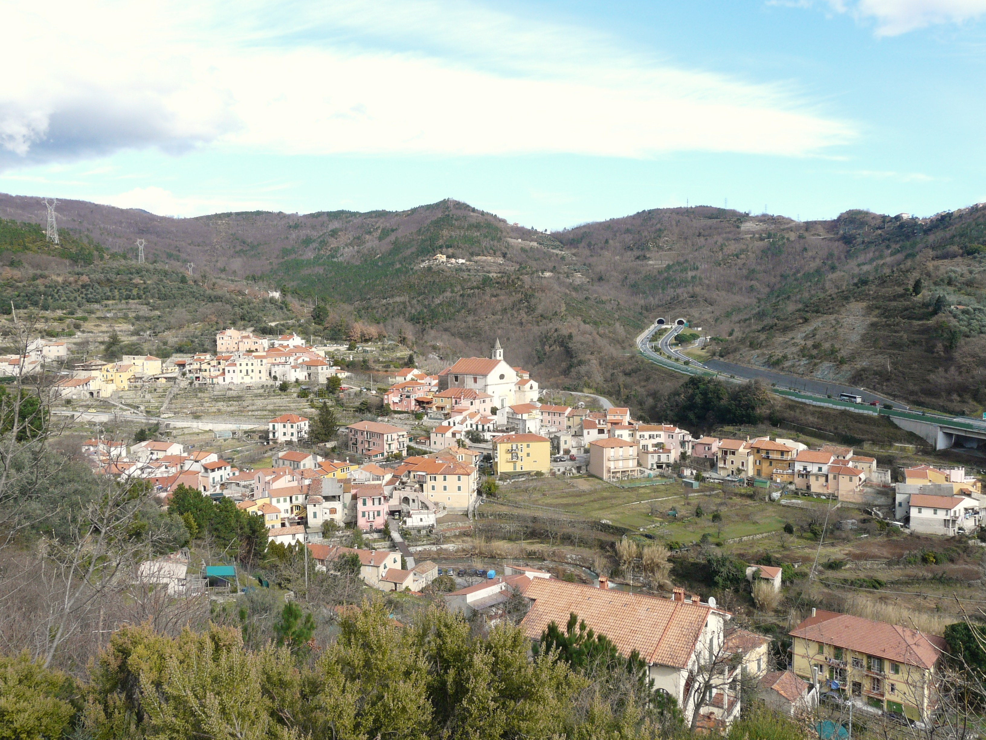 Panorama di Orco Feglino, Liguria, Italia